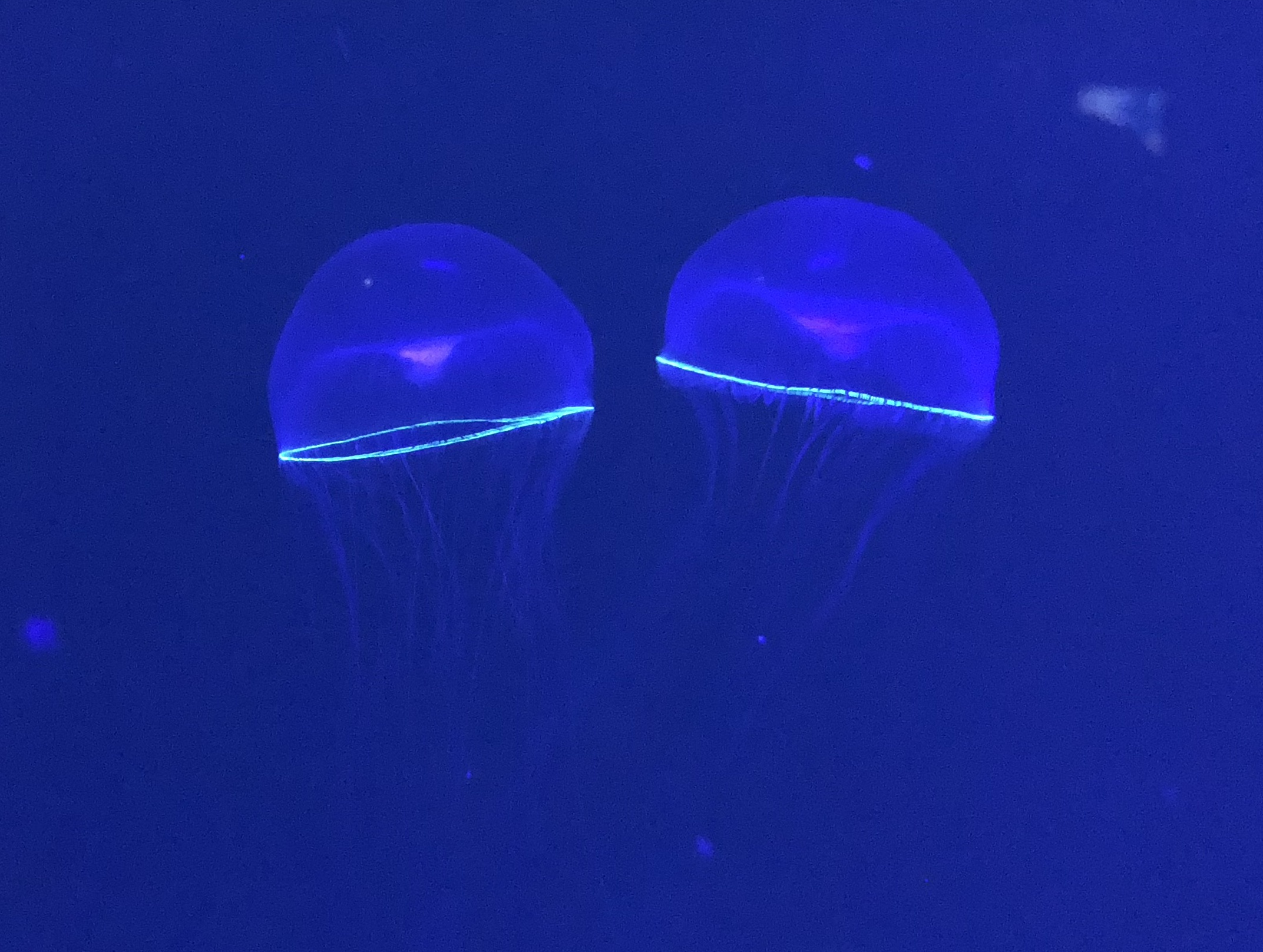 オワンクラゲ。鶴岡市立加茂水族館飼育個体。